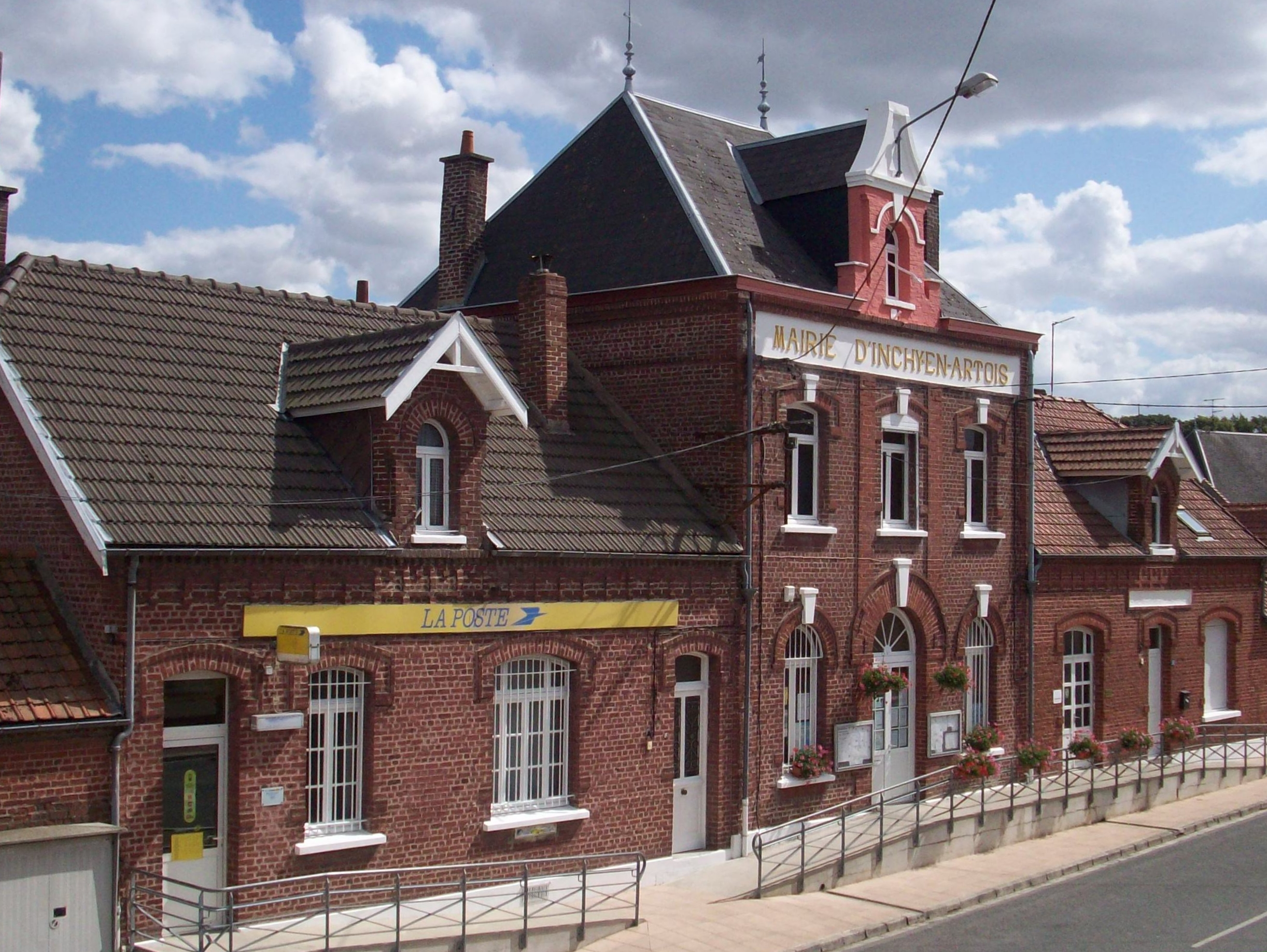 Photo de la mairie d'Inchy-en-Artois